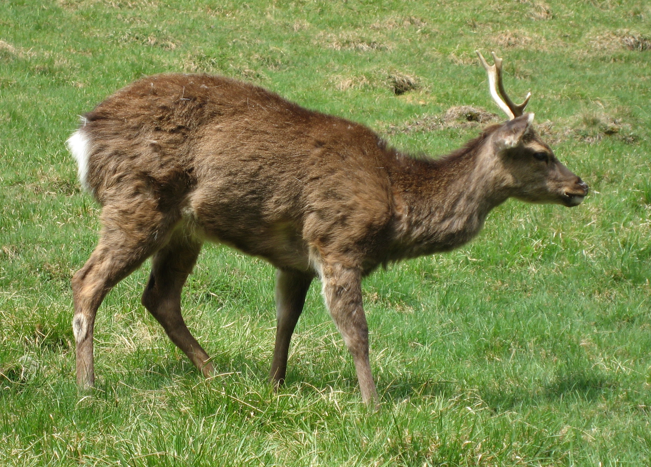 Cervus nippon taioanus in Parc de Merlet (Cerf Sika) Map: 45° 54' 26" N 6° 49' 2" E